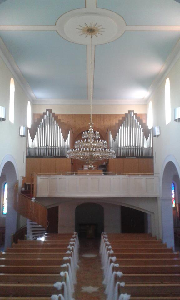 Hefererove orgulje u Crkvi sv.Jakova u Dicmu. Sagrađene 1998.godine.